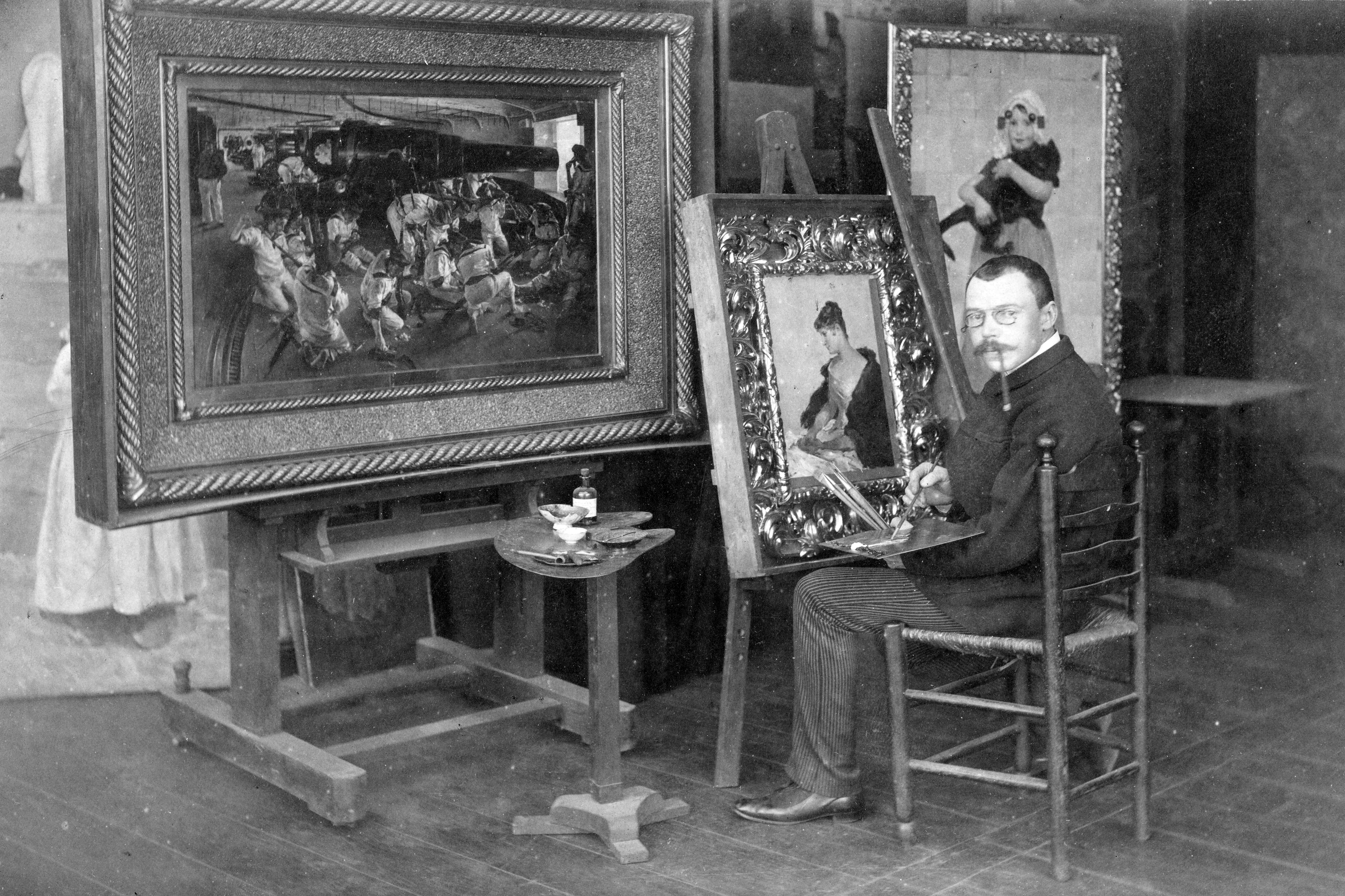 Paul Hoecker-Atelier in Oberlangenau